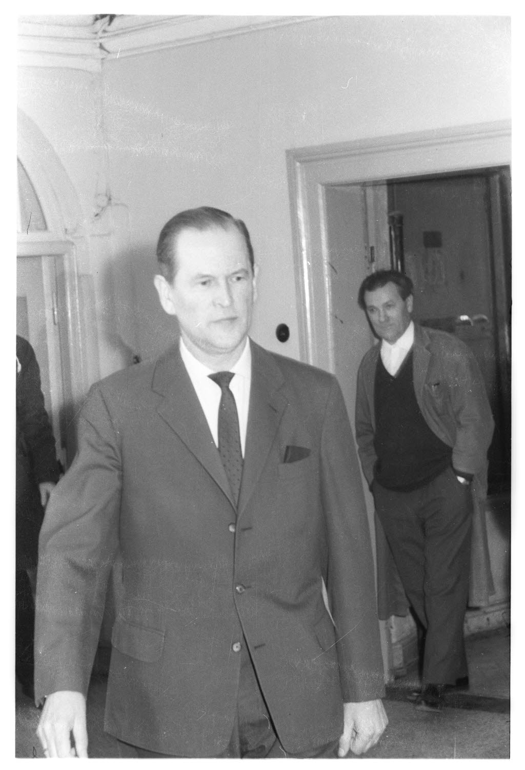 Martin Fellenz (Bildmitte) wird vom Kieler Schwurgericht zu sieben Jahren Zuchthaus verurteilt.